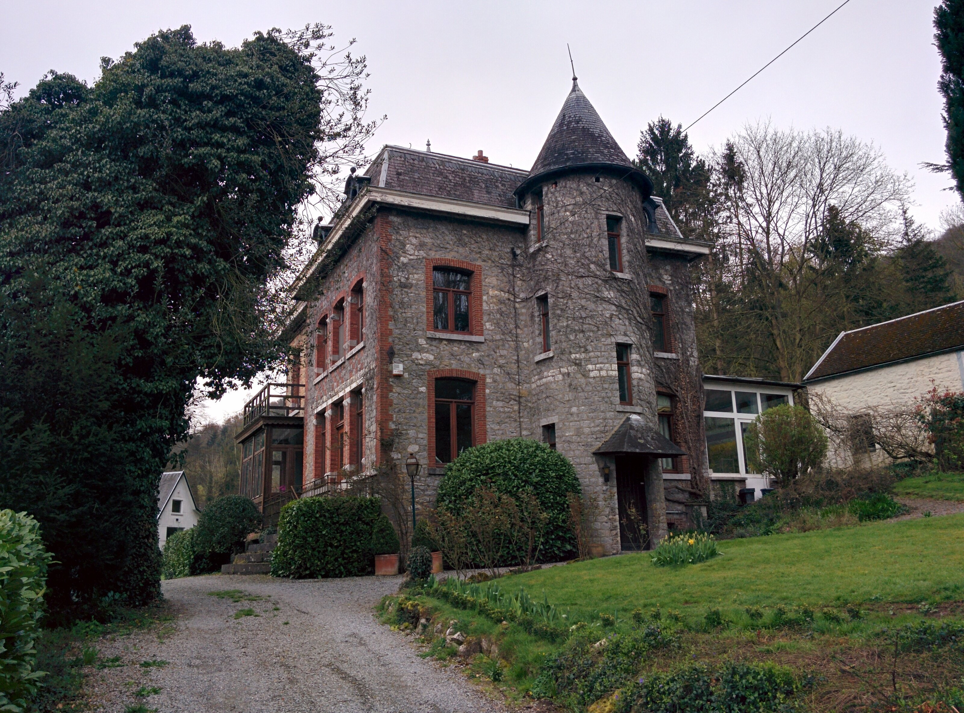 Résidence d'Eugène Ysaÿe à Godinne où il séjourna de 1902 à 1912.